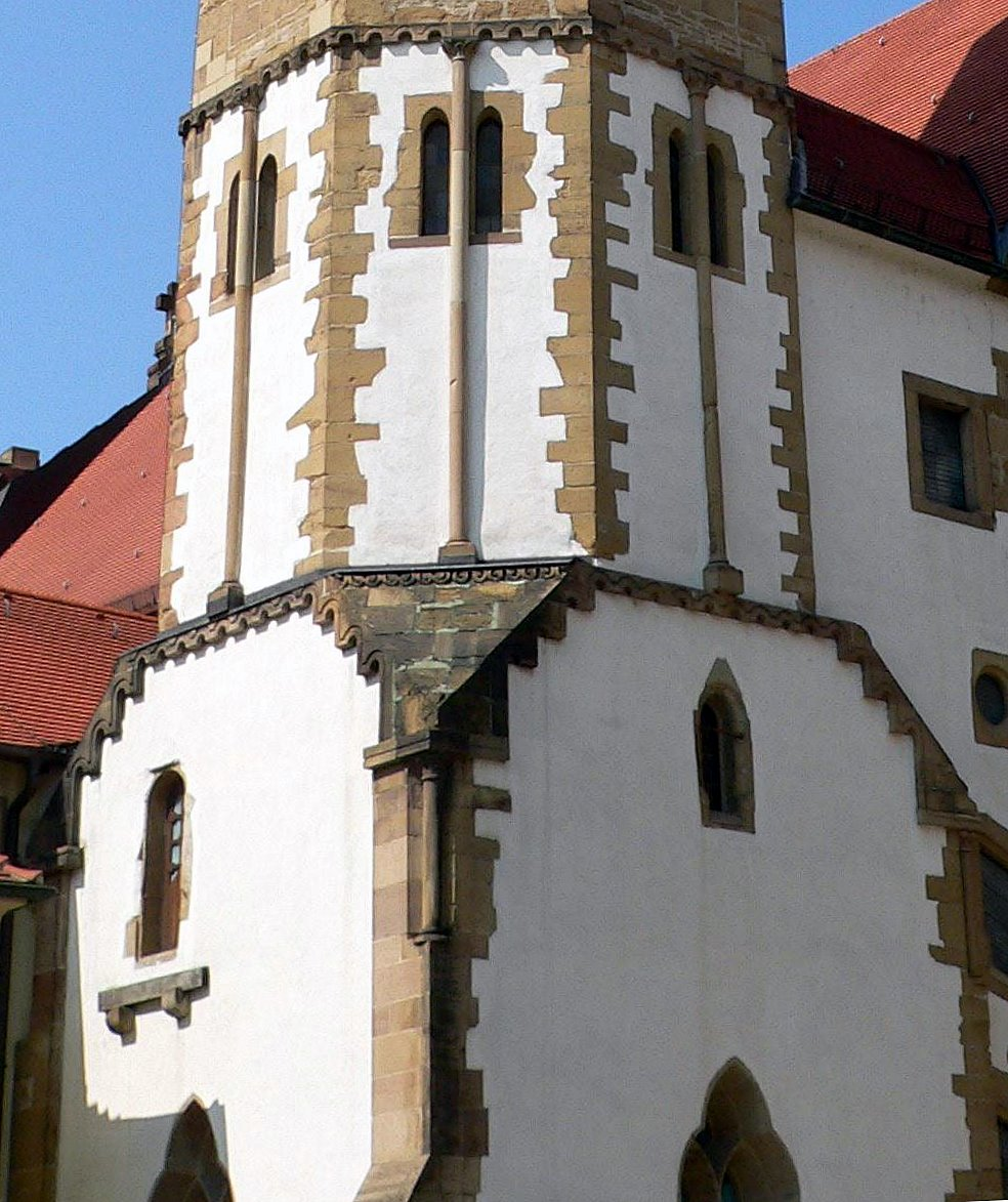 Minster "Deutsch-Ordens-Münster" (View from inner courtyard) of Heilbronn - Germany